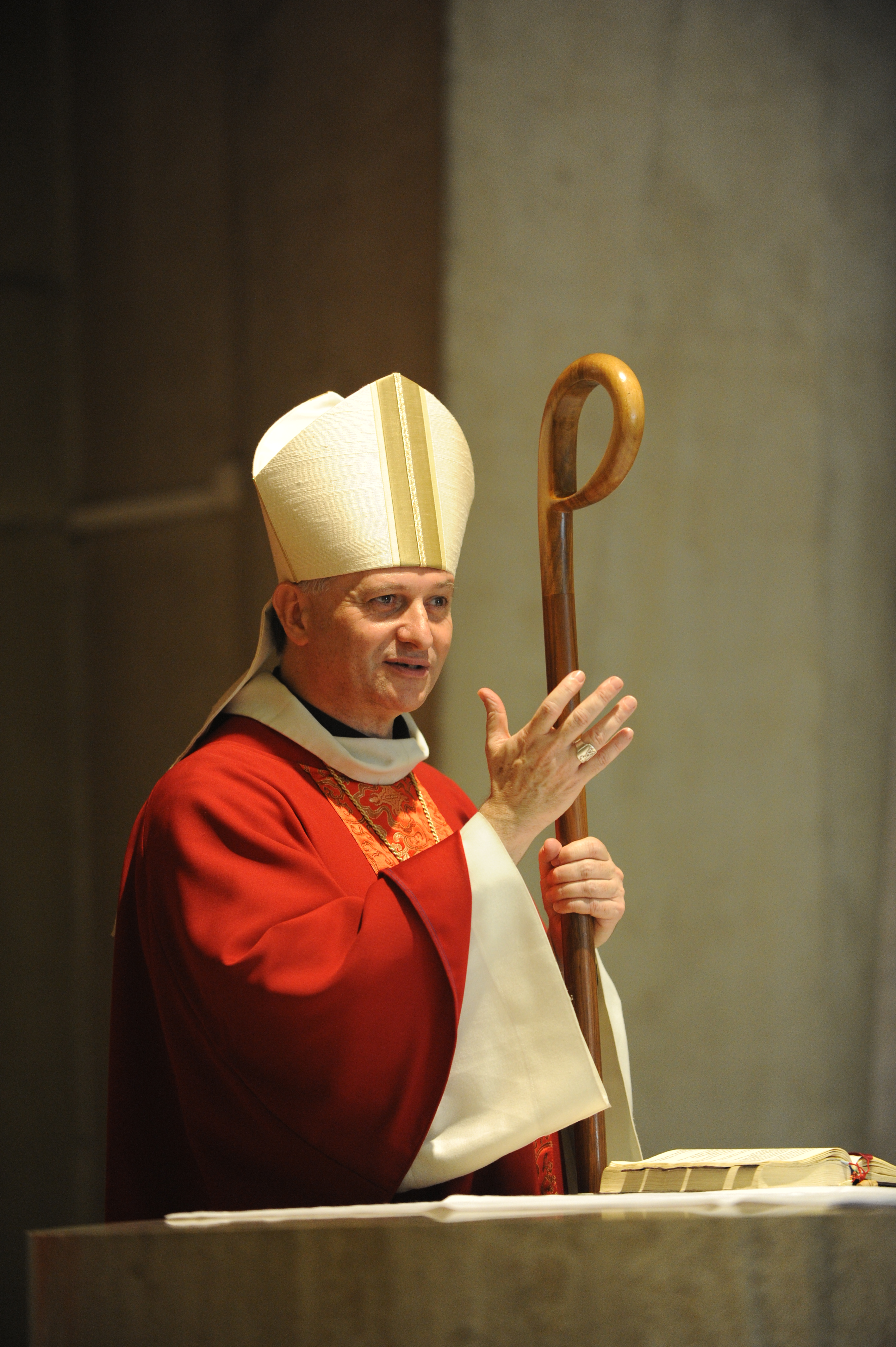 Jean-Yves Nahmias lors d'une célébration de confirmations à Notre-Dame de la Salette (Paris 15e) le 27 mai 2012